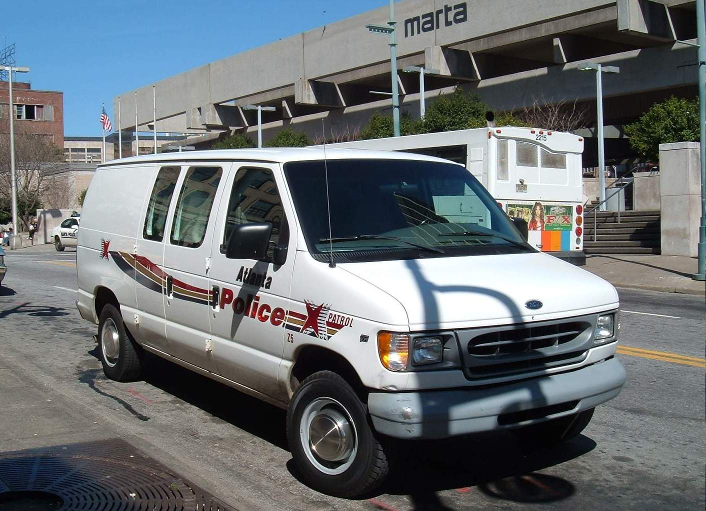 Ford van